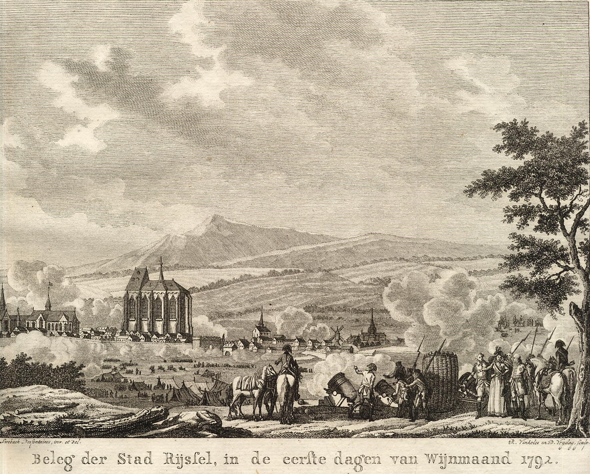 Belegering en bombardement van de Franse vesting Lille in 1792 door de geallieerde troepen.